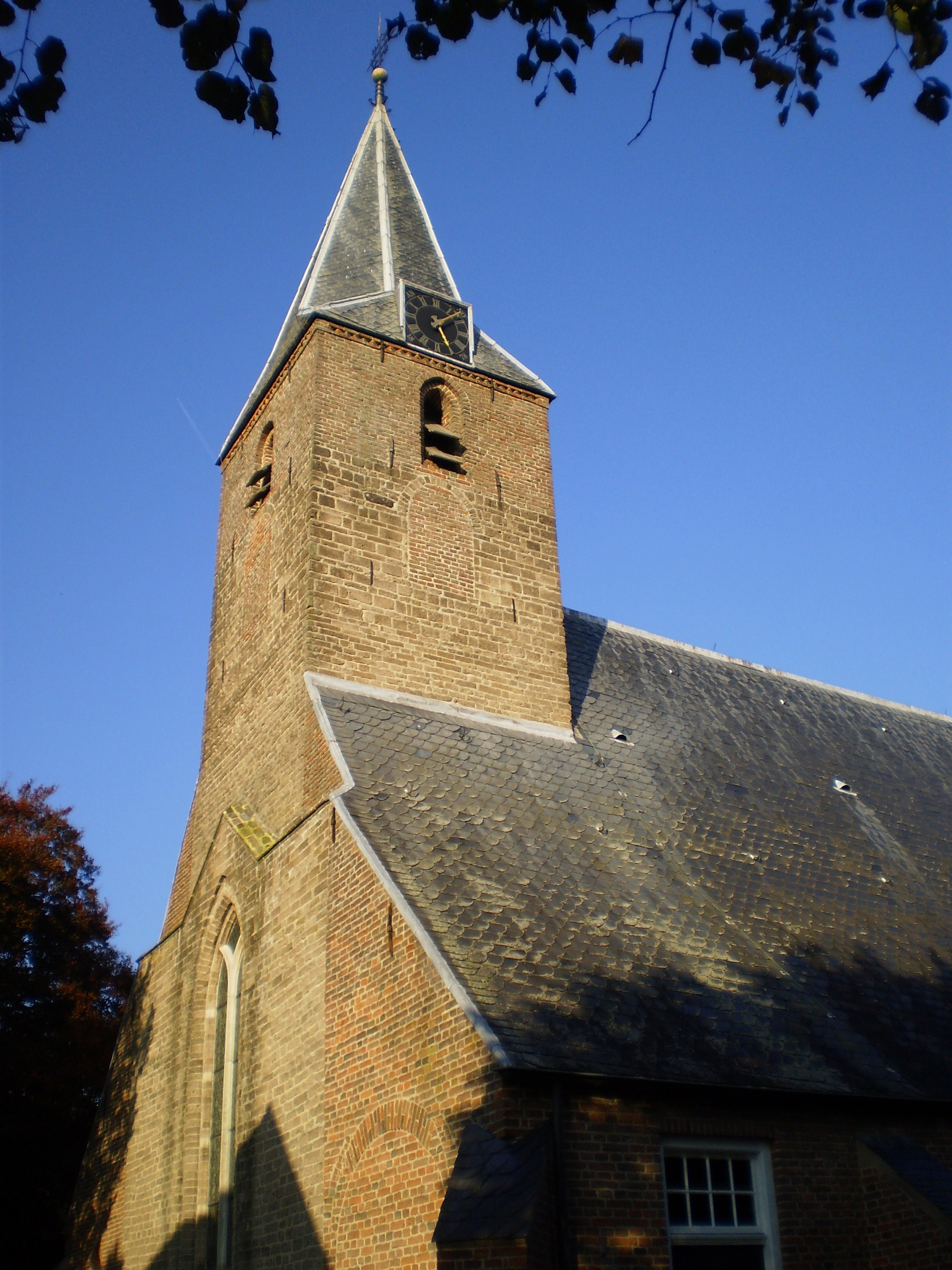 Hervormde kerk, Dorpsstraat, Oene (Gelderland, NL)